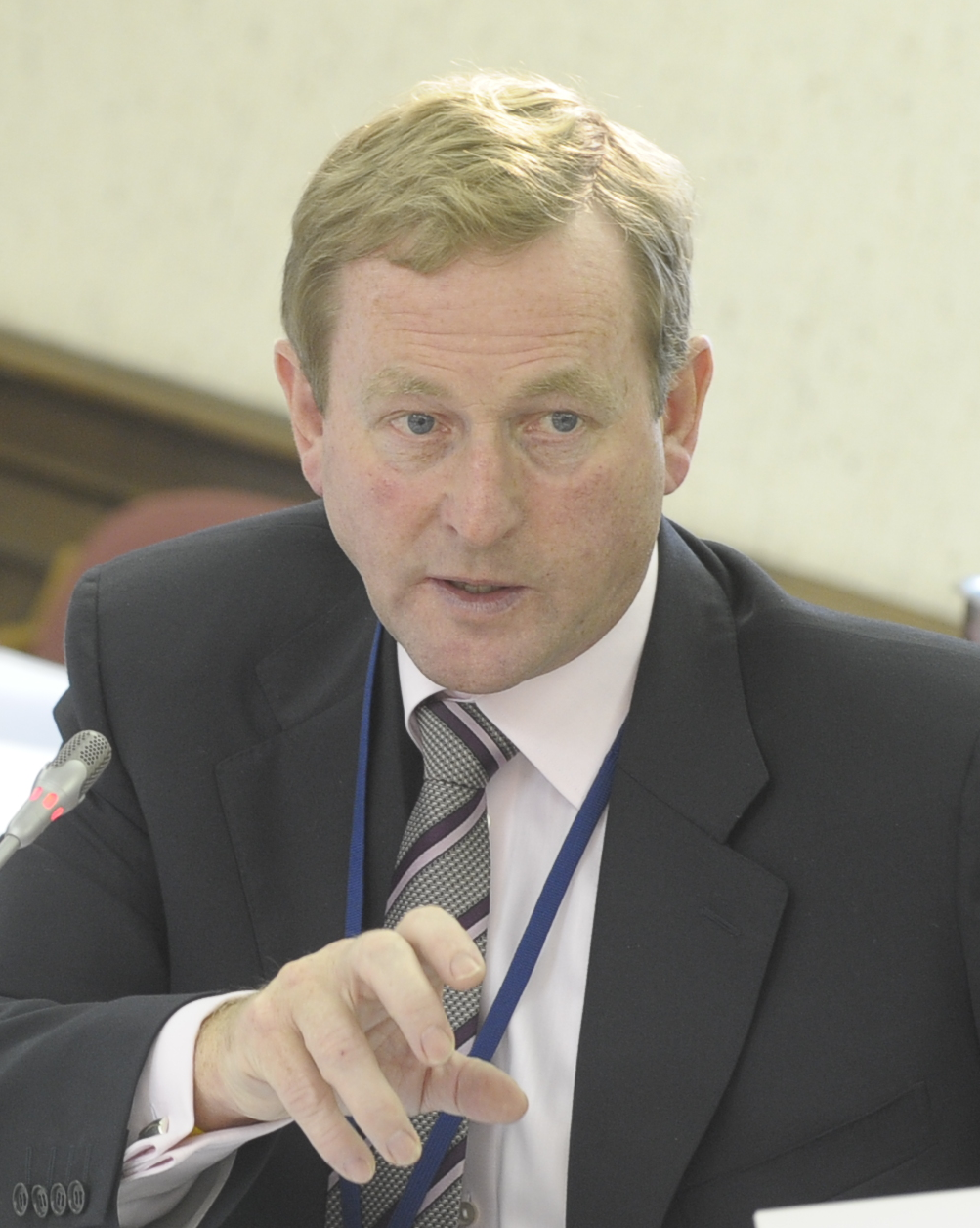 Enda Kenny at EPP Summit October 2010 Enda Kenny au sommet du PPE en octobre 2010.